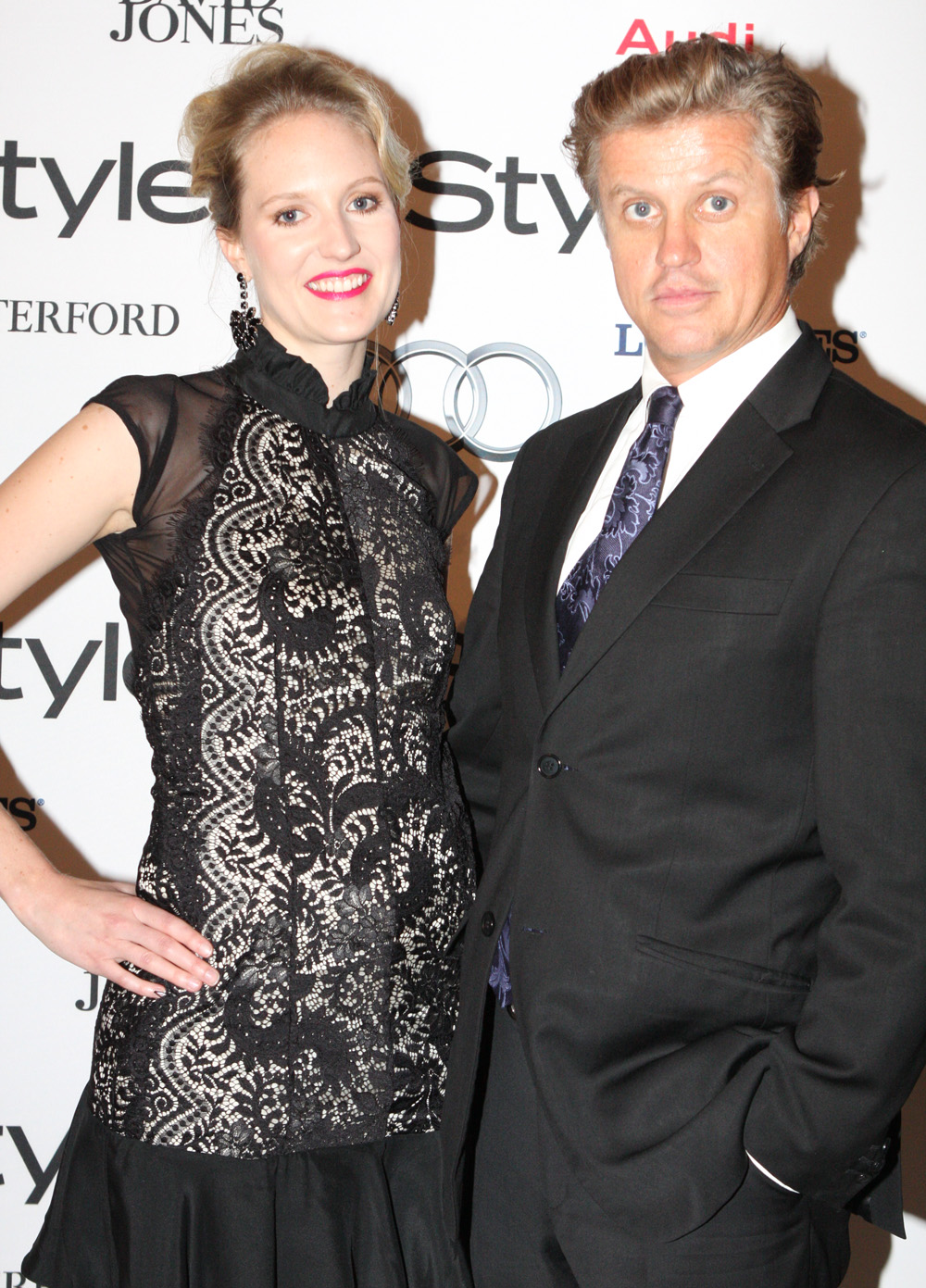 Shannon Murphy, Dan Wyllie